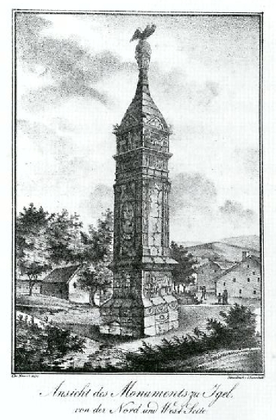 Christoph Hawich, "Ansicht des Monuments zu Igel von der Nord und West Seite", 1823, Lithographie (Stadtmuseum Simeonstift Trier)